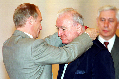 МОСКВА, КРЕМЛЬ. Церемония вручения государственных наград. Орден «За заслуги перед Отечеством» III степени вручен вице-президенту Российского футбольного союза Никите Симоняну.